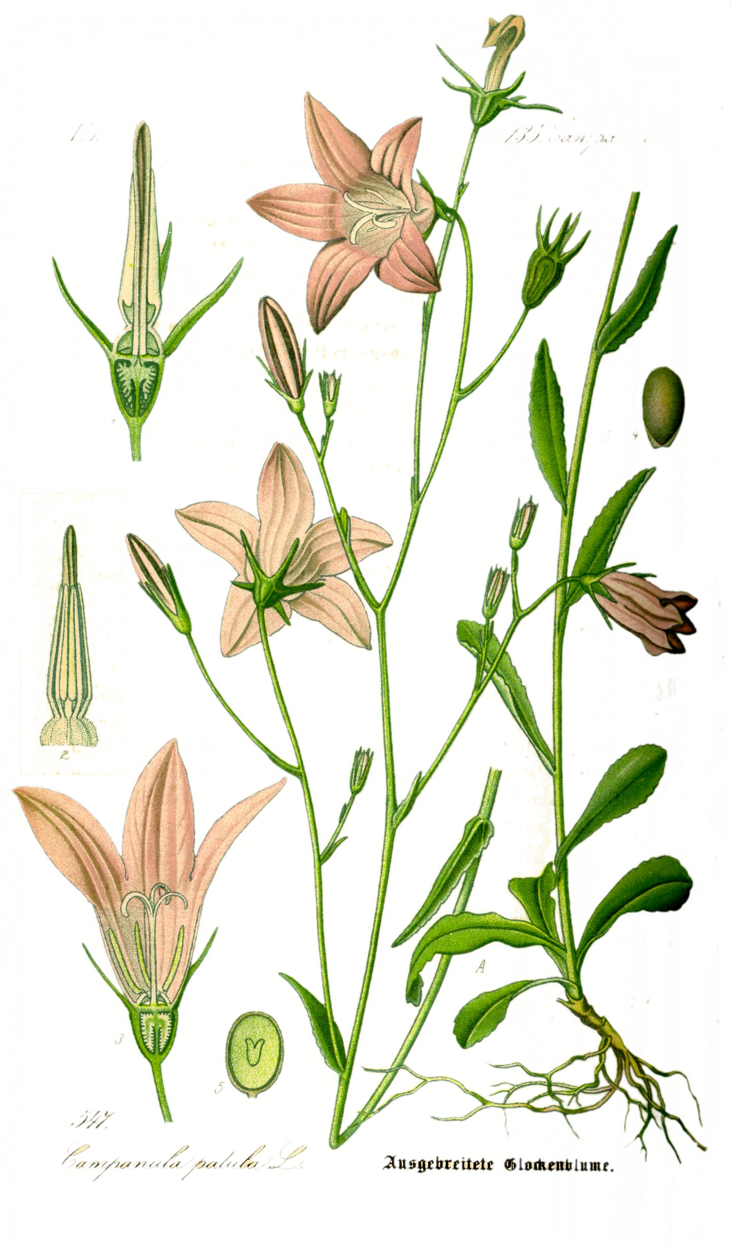 Campanula patula